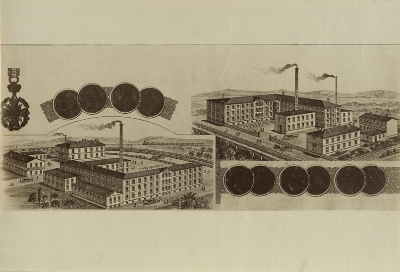 Първа Софийска фабрика за вълнени платове на Д. Беров & А. Хоринек в София. Основано в 1906 г. с основен капитал 187 105 лева, с 40 работници. През 1912 г. е с основен капитал 628 825 лева и 200 работници. Фотоалбум с фотографии на български индустриални предприятия от периода 1887-1912 г., подарен от Съюза на българските индустриалци на цар Фердинанд І по случай 25-годишнината от възшествието му на българския престол.